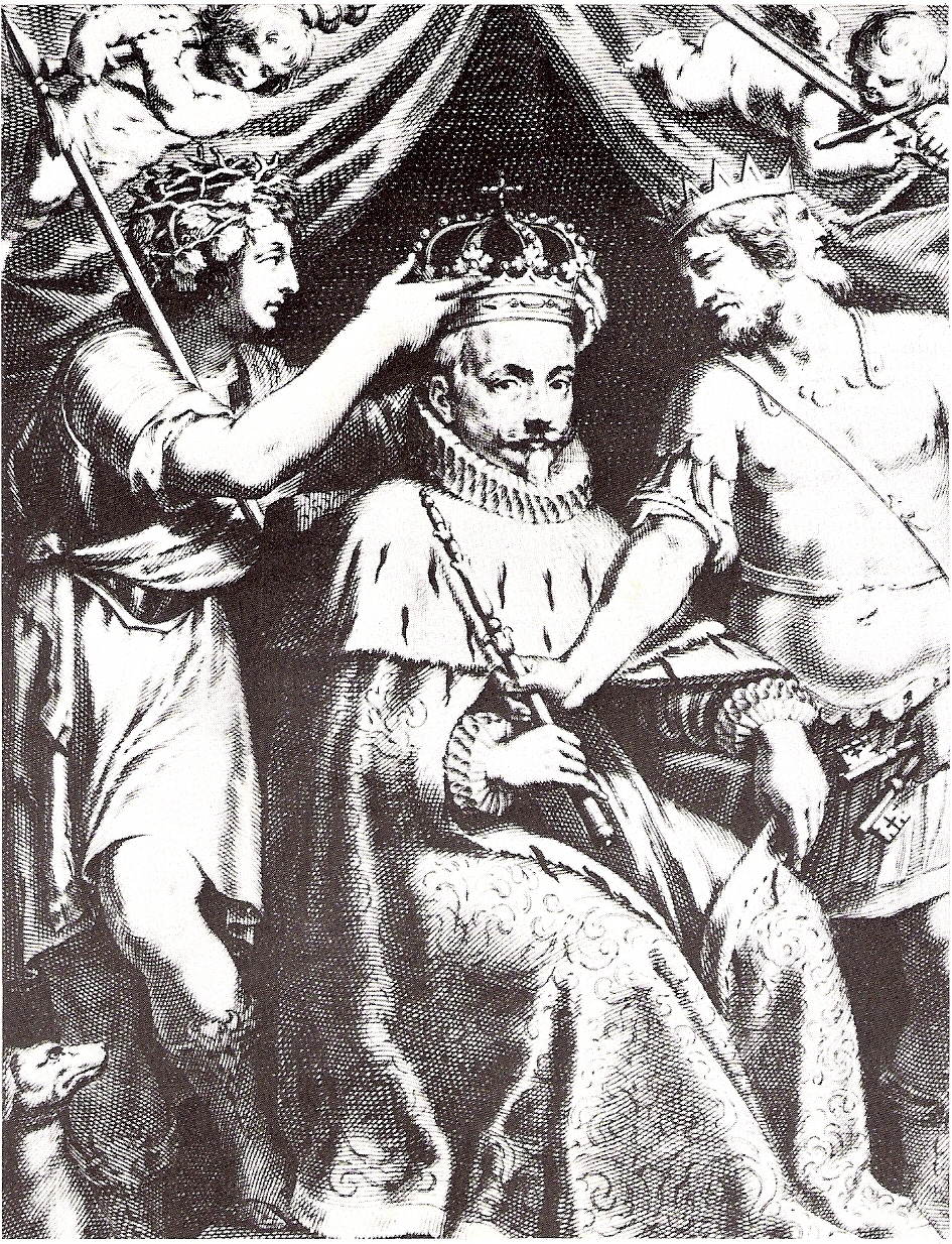 Dipinto del doge Agostino Pallavicini (1637-1639)